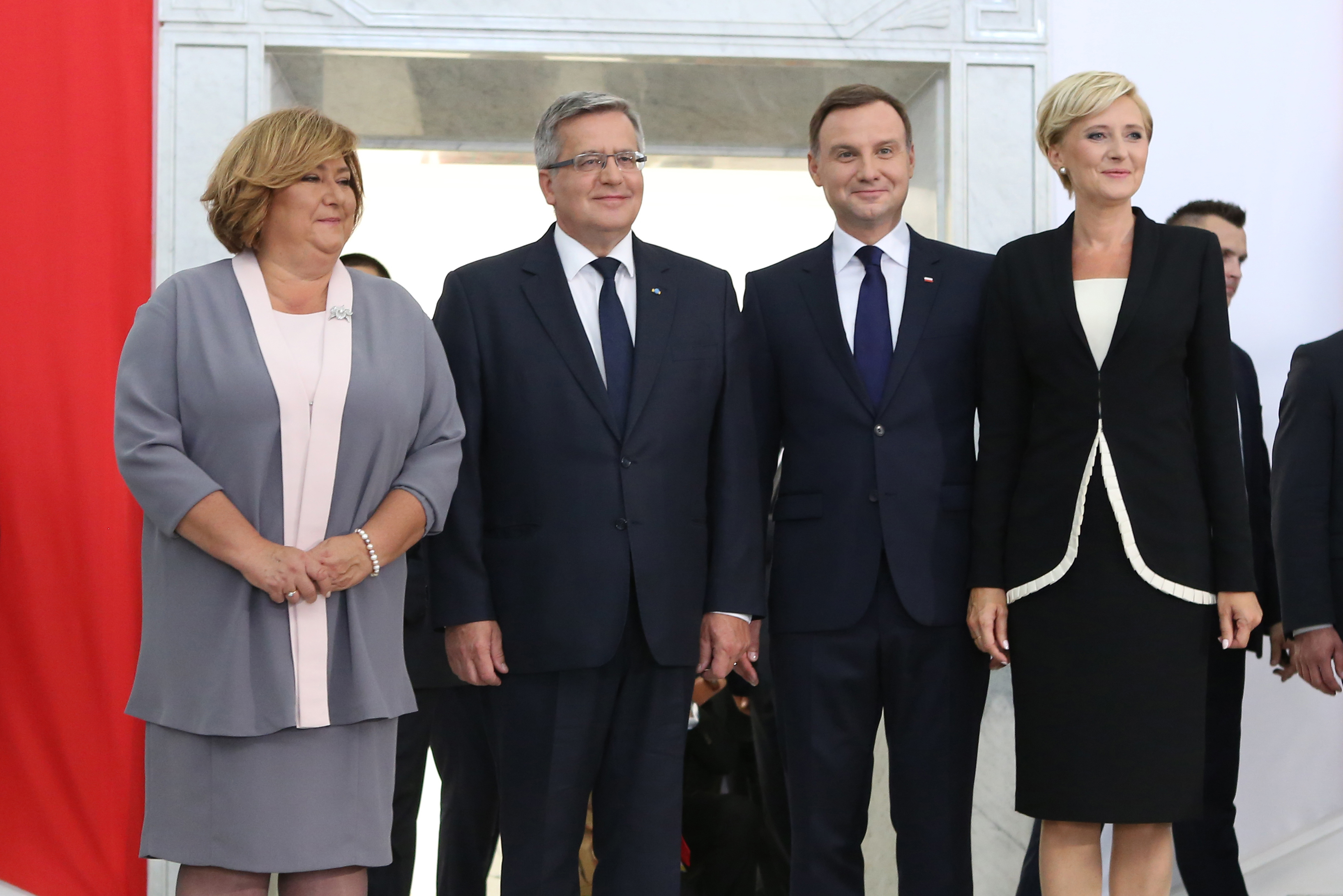 Anna Komorowska, Bronisław Komorowski, Andrzej Duda i Agata Kornhauser-Duda w gmachu Sejmu po zakończeniu obrad Zgromadzenia Narodowego zwołanego w celu odebrania przysięgi od nowo wybranego prezydenta